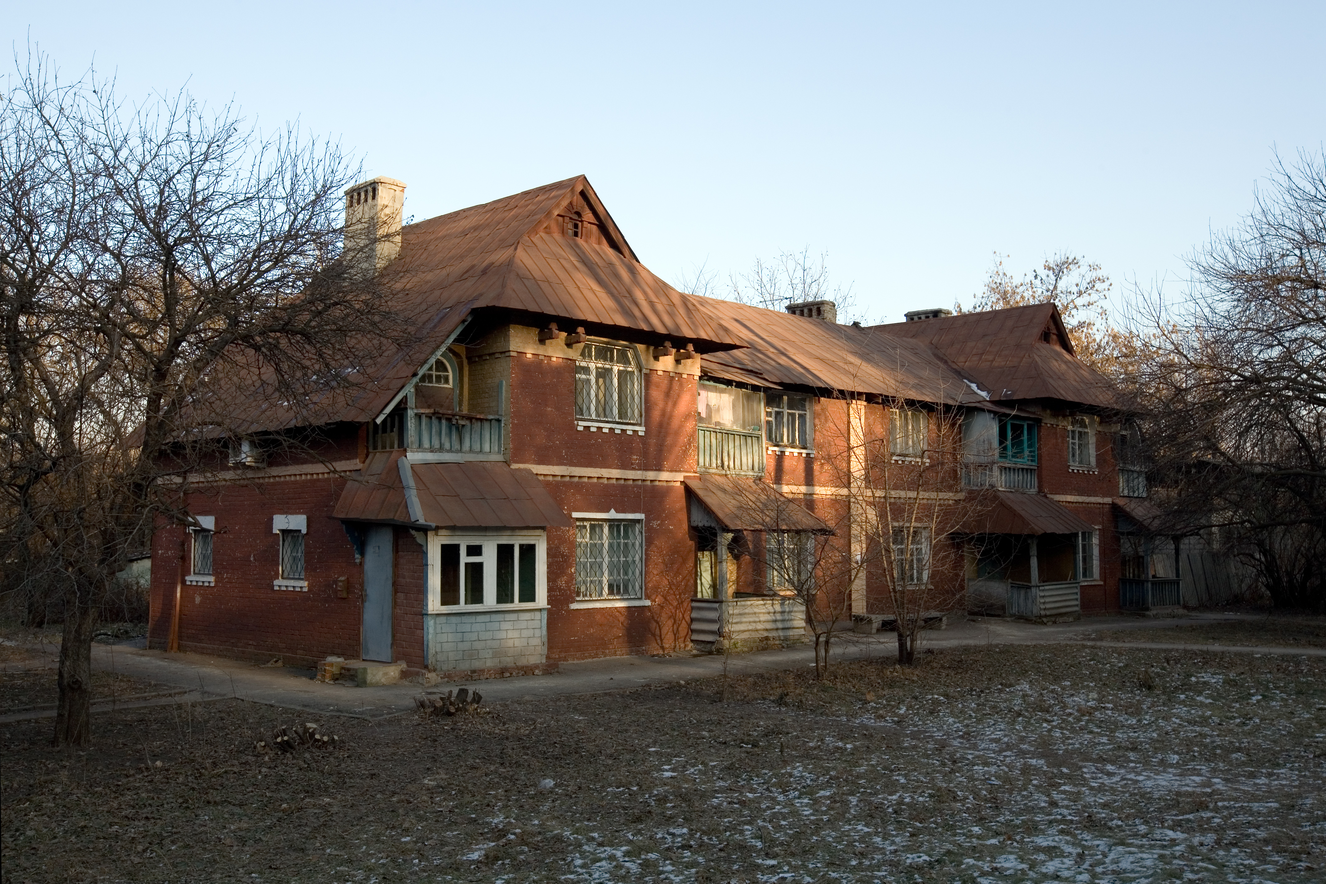 HEMZ Townhouse in Moskovsky Prospekt (built c. 1923)